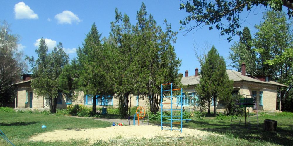 Дитячий садок у селі Манжелія (Глобинський район, Полтавська область).